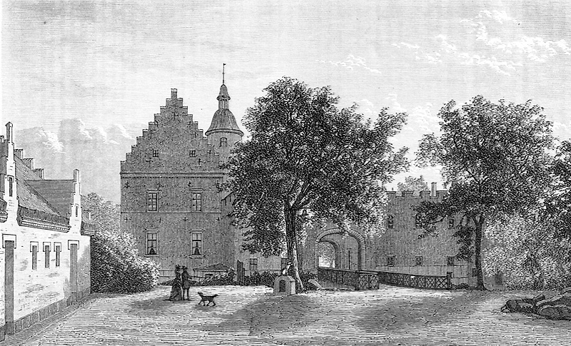 Broholm er en gammel sædegård som nævnes første gang i 1326. Gården ligger i Gudme Sogn, Gudme Herred, Gudme Kommune, Fyns Amt, Denmark. udgave 1873